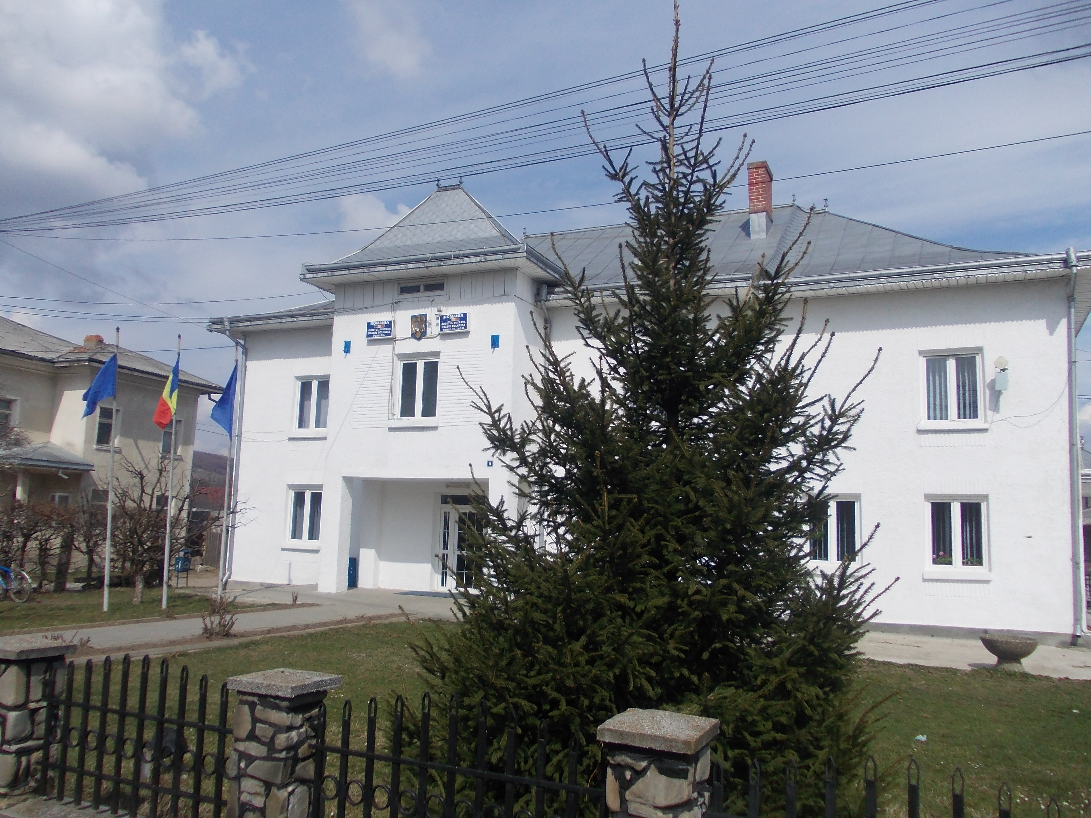 Primăria şi Consiliul Local Dolhasca